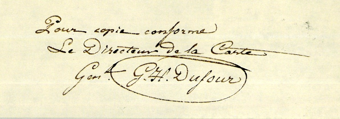 Guillaume-Henri Dufour : Signatur